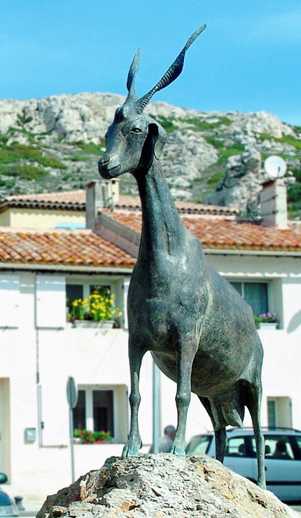 Statue de chèvre devant la mairie du village du Rove (Bouches du Rhône, France)